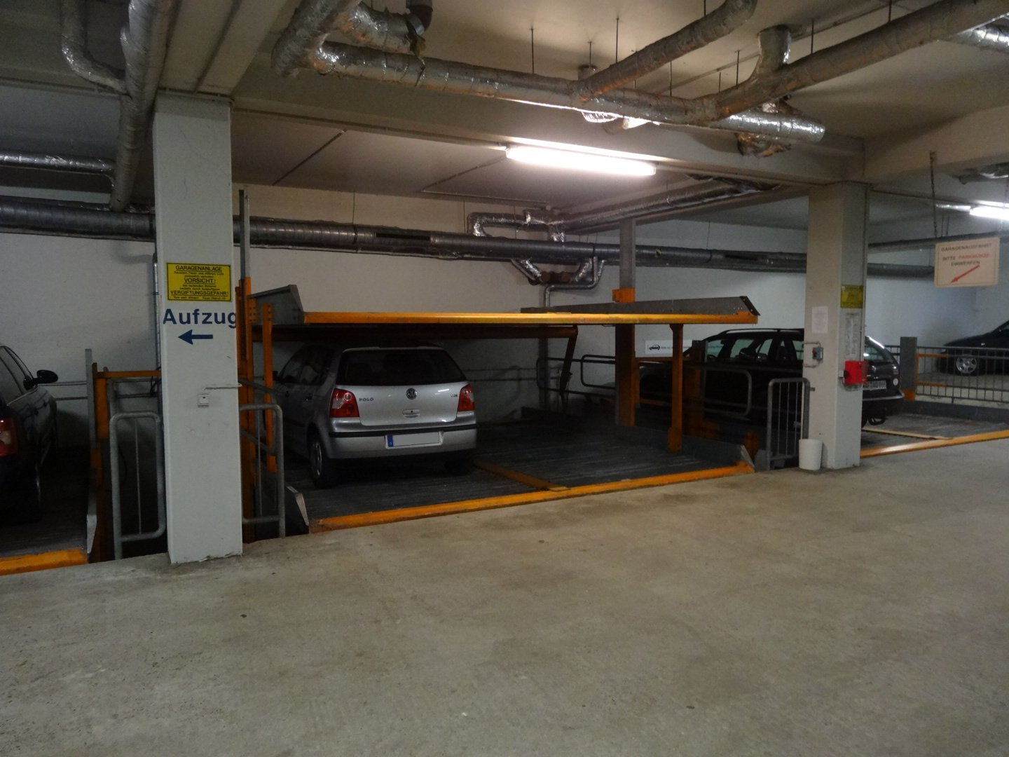 Automatisches Parkhaus in einer Tiefgarage in Bremen.